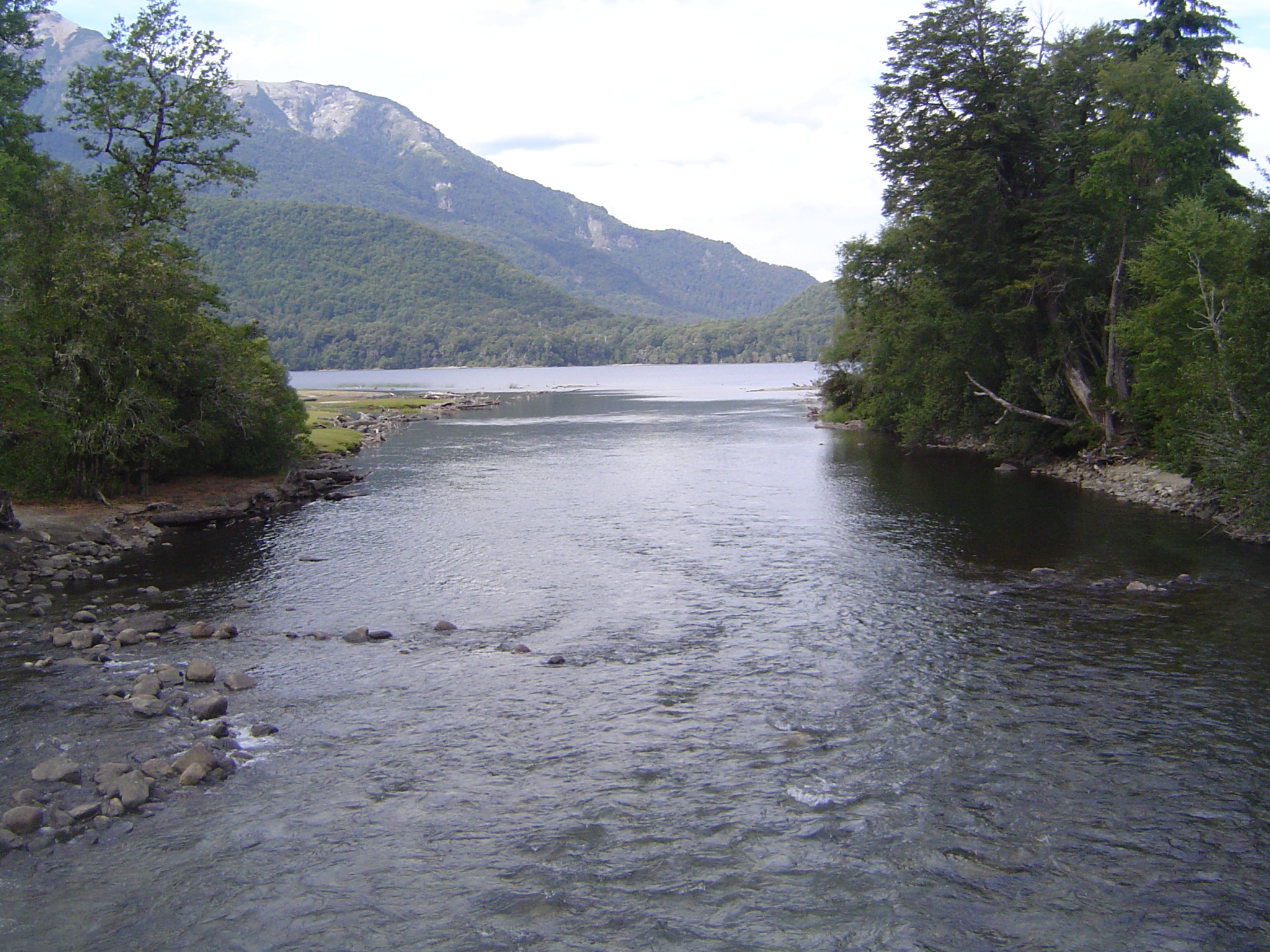 Rio Chachin en su desembocadura en el lago Lácar